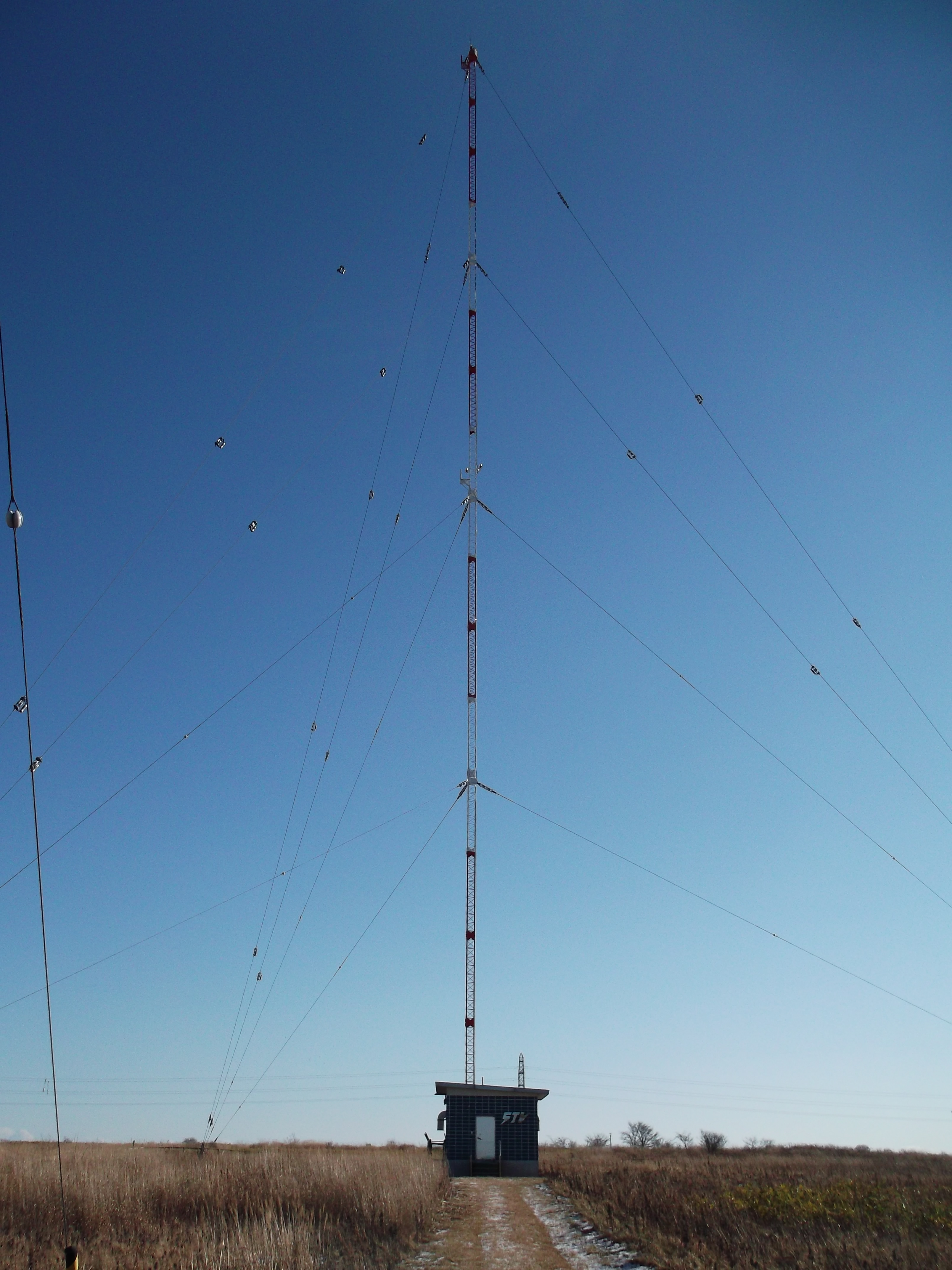 STVラジオ 根室ラジオ中継局